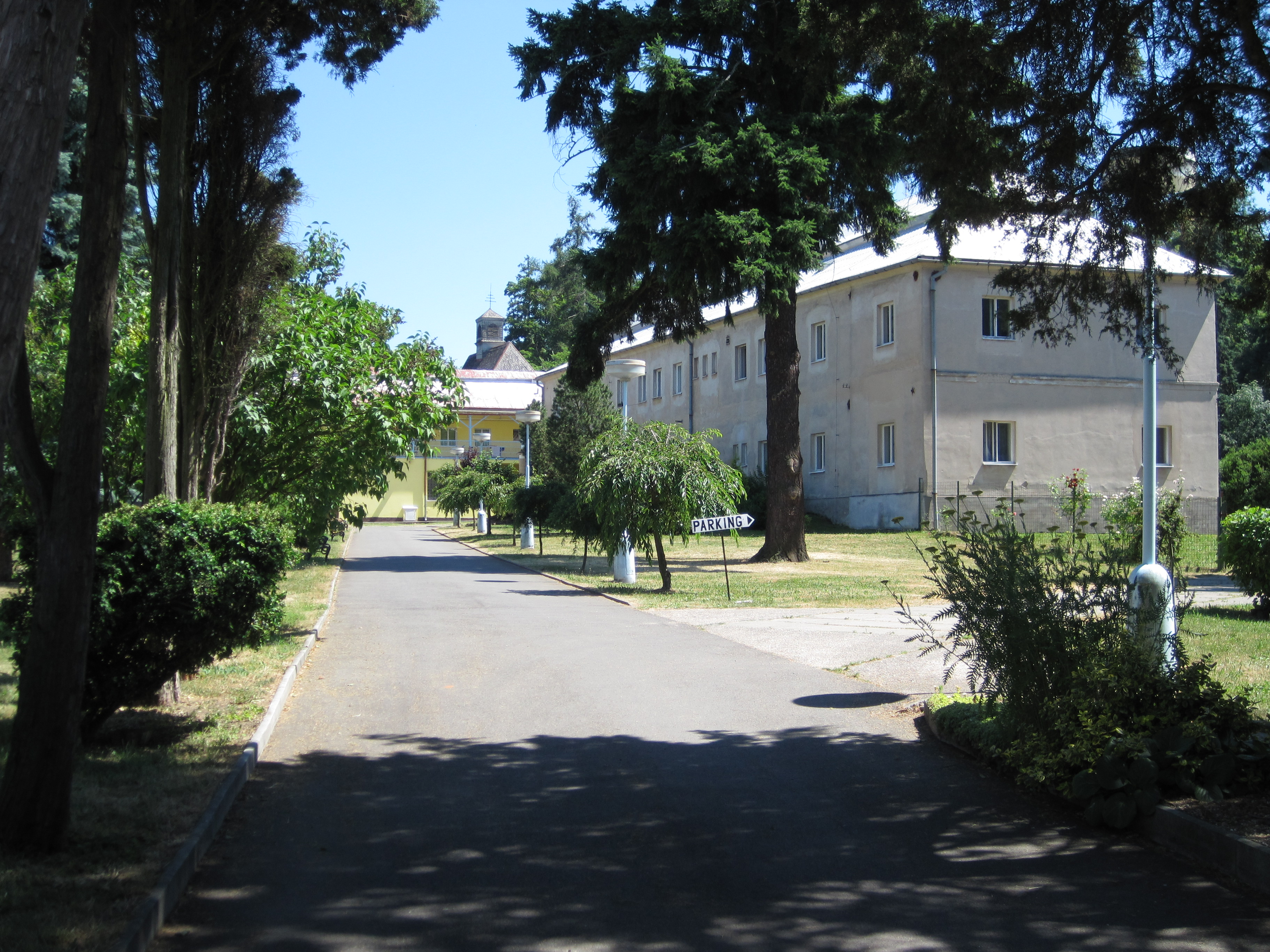 Vlčí Pole - zámek